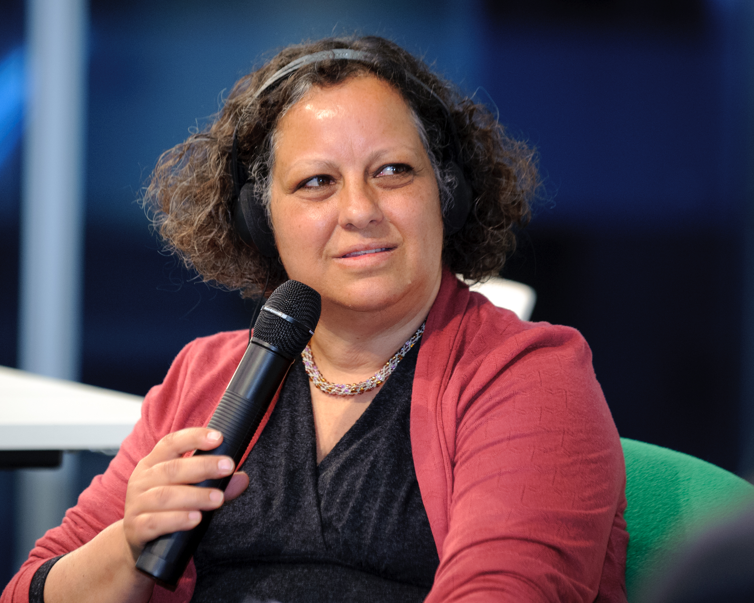 Sara Shilo (Schriftstellerin, Israel) Deutsch-Israelische Literaturtage 2012 Die deutsch-israelischen Literaturtage - organisiert vom Goethe-Institut und der Heinrich-Böll-Stiftung - finden seit sechs Jahren abwechselnd in Berlin und in Tel Aviv statt. Neben Lesungen und Diskussionen gibt es im April auch Filme zu sehen. Abgeschlossen wird *beziehungsweise(n)* durch eine Diskussionsrunde, in der Aktivist/innen, Journalist/innen und Autor/innen über den Begriff der Solidarität, über gesellschaftliche Vorstellungen des Zusammenhalts und der sozialen Gerechtigkeit debattieren. Foto: Stephan Röhl